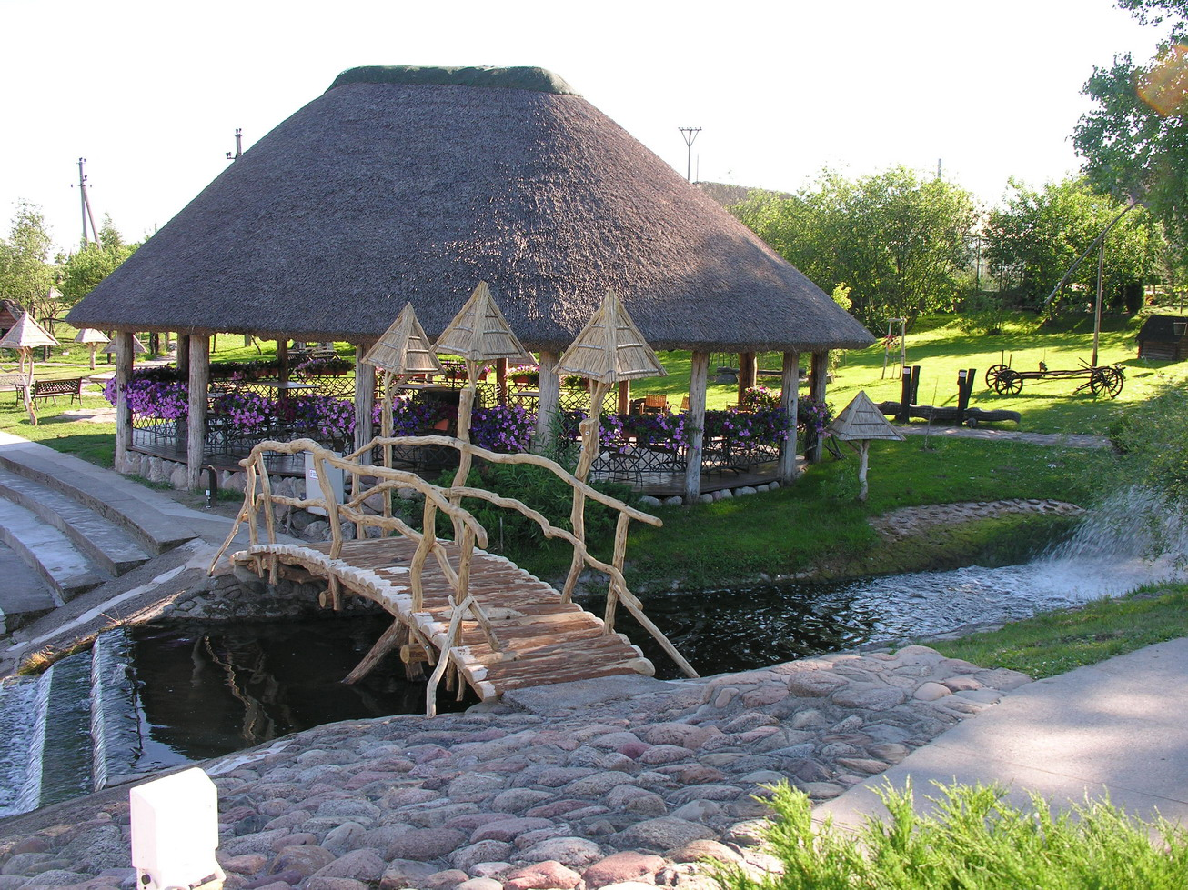 Padvariai, Kretingos raj.. Kaimo turizmo sodyba. Foto: Algirdas, 2006 m. birželio 29 d., lietuva